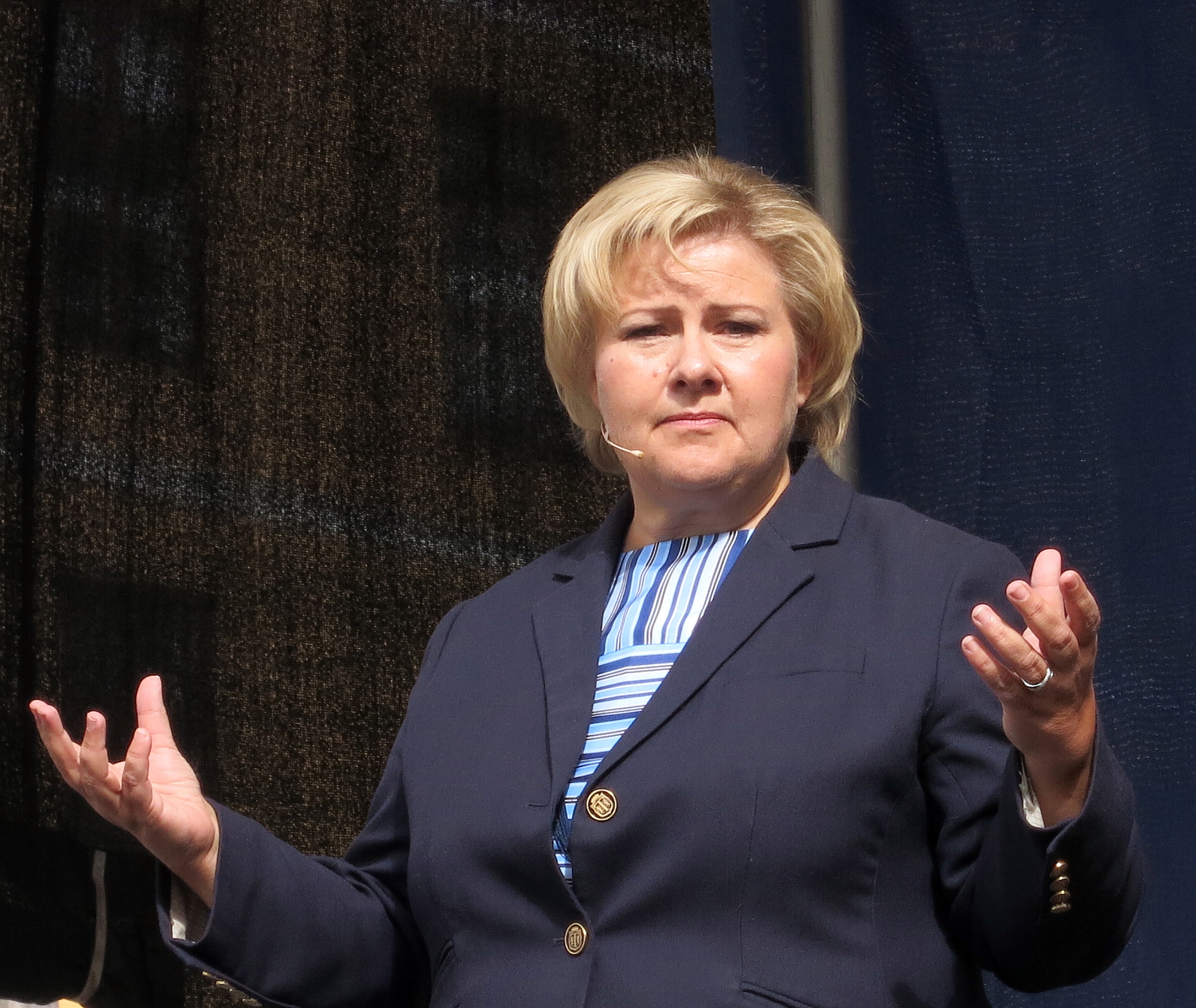 Erna Solberg